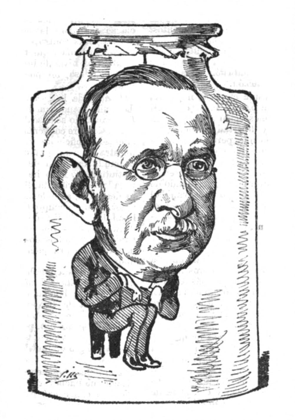 Tomás Santero y Moreno.